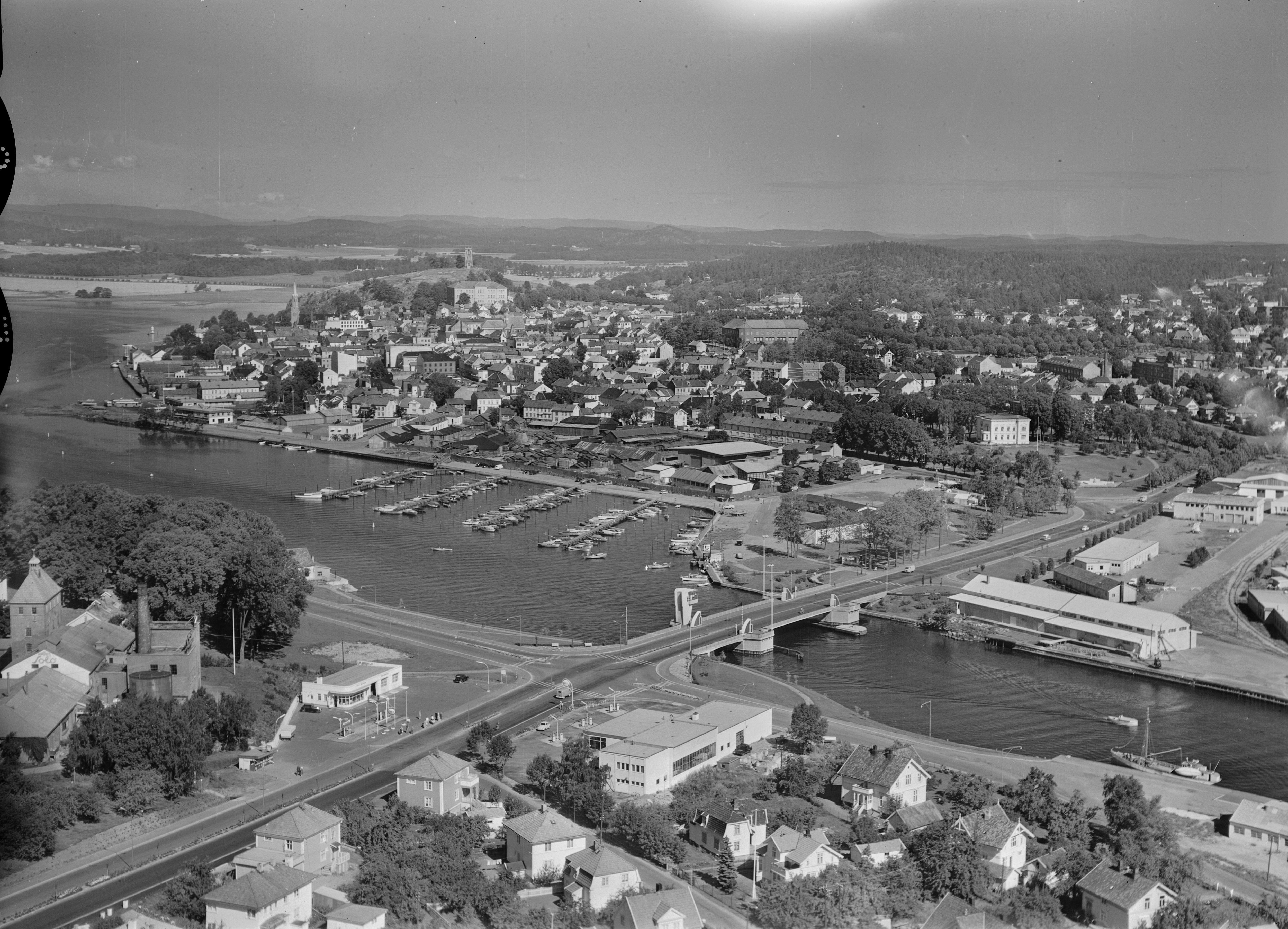 WF.S.UNUM001